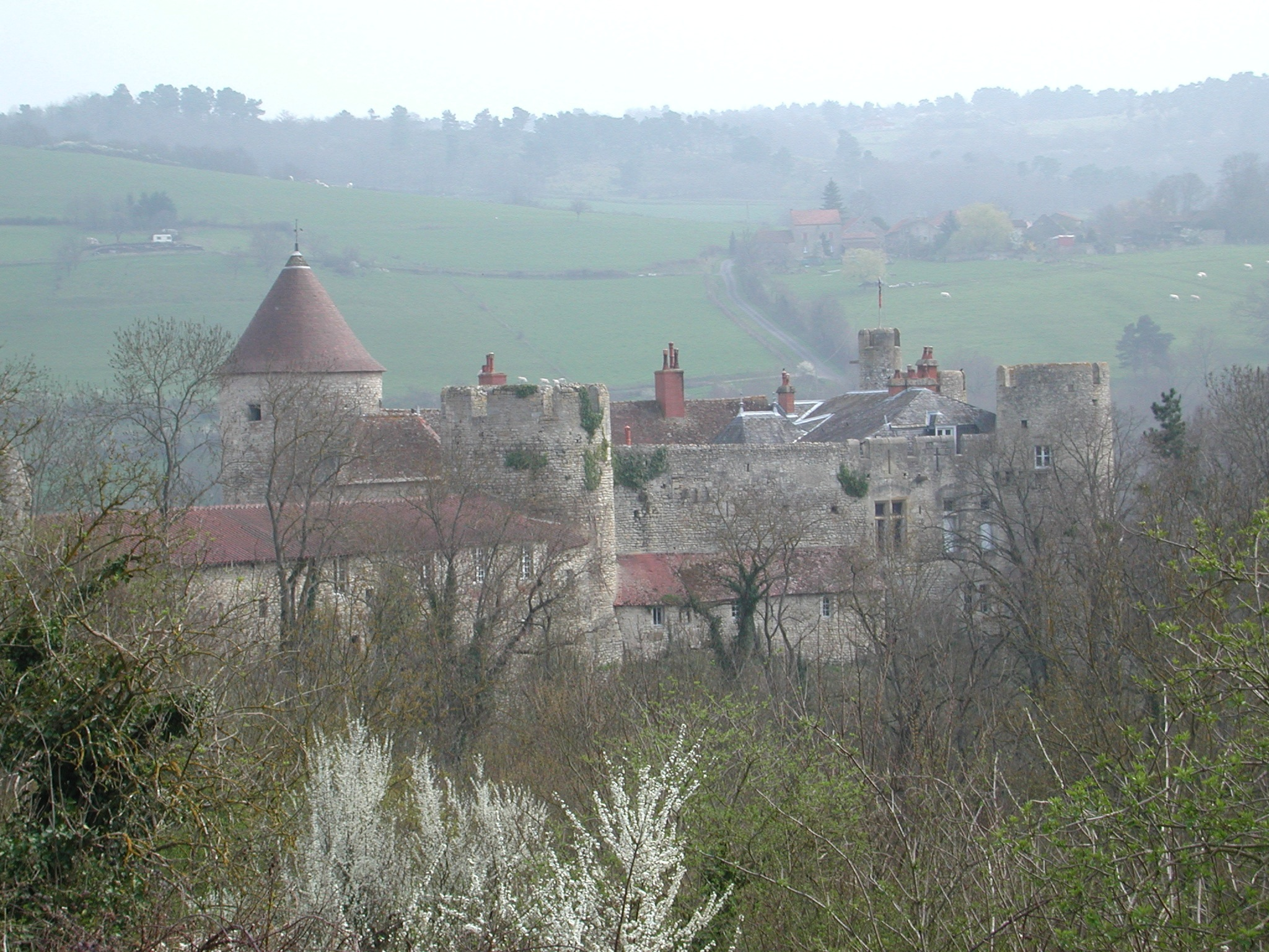 Château de Rochefort, à Saint-Bonnet-de-Rochefort (Allier, France). Façade occidentale, à l'opposé de la terrasse dominant la Sioule, prise du GR 300 descendant de Rochefort vers Les Radurons. Au fond, coteaux de la rive droite de la Sioule, avec le hameau des Visiers.